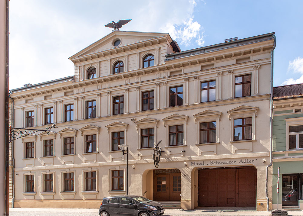 Stendal Kornmarkt 5, Hotel, Baudenkmal